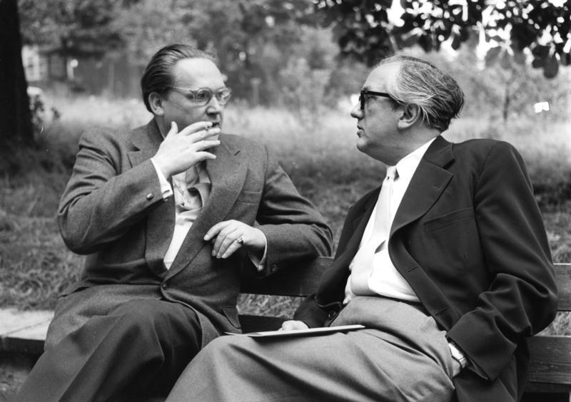 Juli 1957 12. Internationale Ferienkurse für neue Musik, Darmstadt Dr. Wolfgang Steinecke im Gespräch mit Professor Heinz Dressel (Direktor der Folkwangschulen Essen)